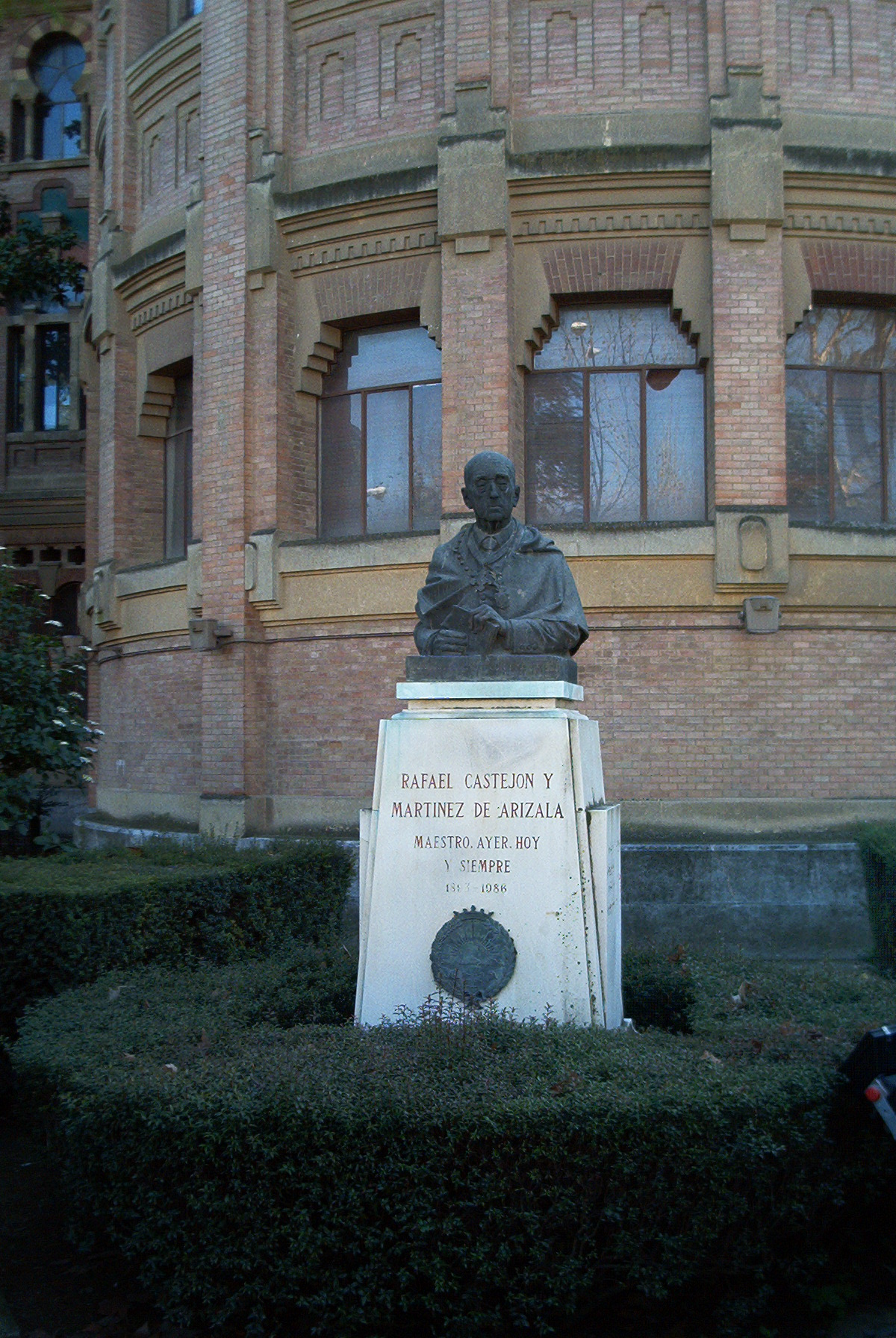 Foto de la estatua erigida en honor de Don Rafael Castejón y Martínez de Arizala. Uno de los fundadores de la Universidad de Córdoba (España).